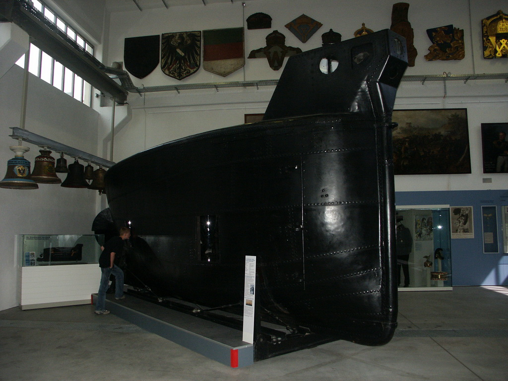 Das U-Boot "Brandtaucher", das erste deutsche U-Boot von 1850, im Militärhistorischen Museum der Bundeswehr in Dresden.